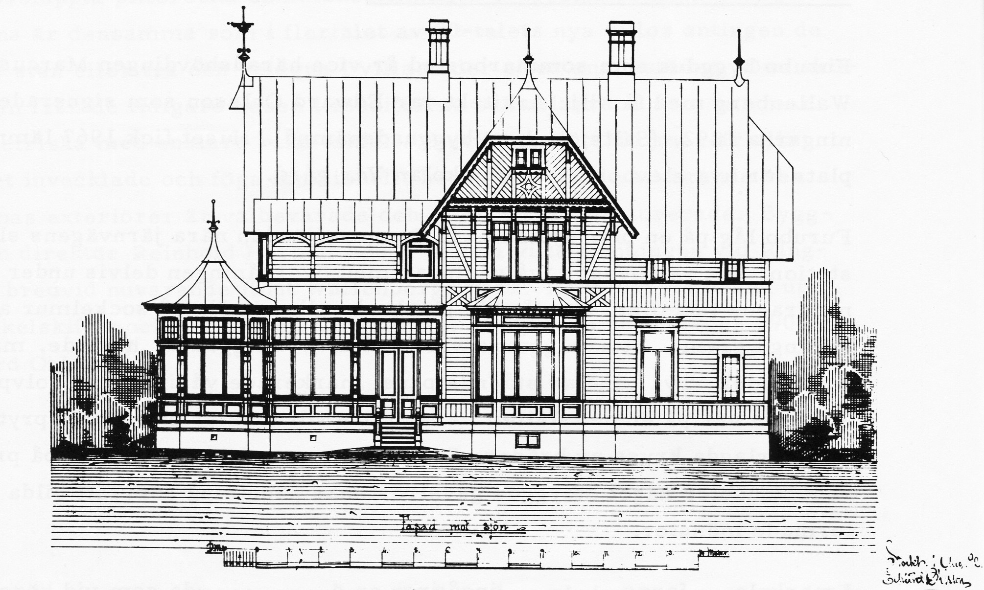 Villa Furubo i Saltsjöbaden (numera riven), arkitek Edward Ohlsson